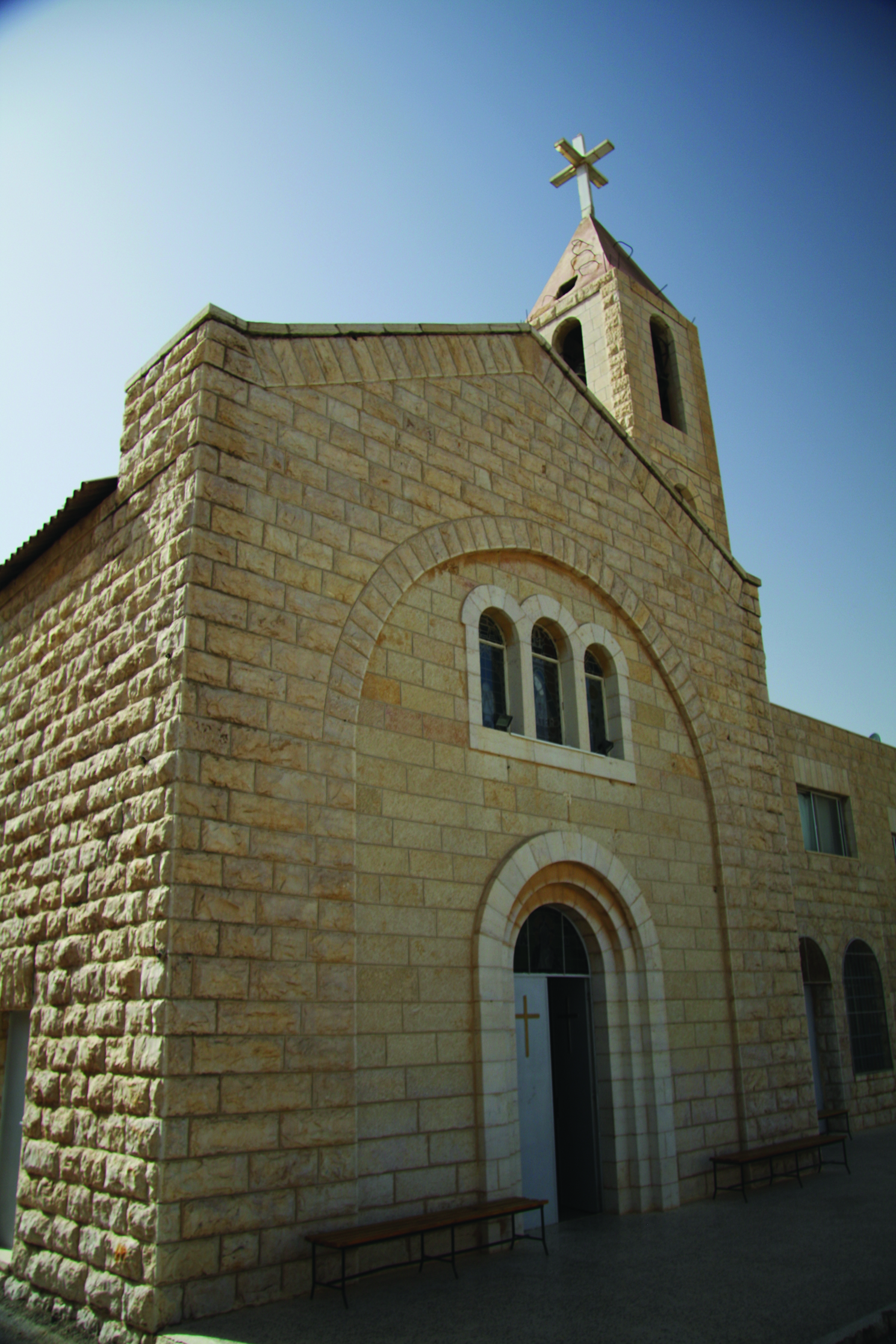 صورة لاحد الكنائس الموجودة في منطقة عنجرة في لواء قصبة عجلون في المملكة الأردنية الهاشمية